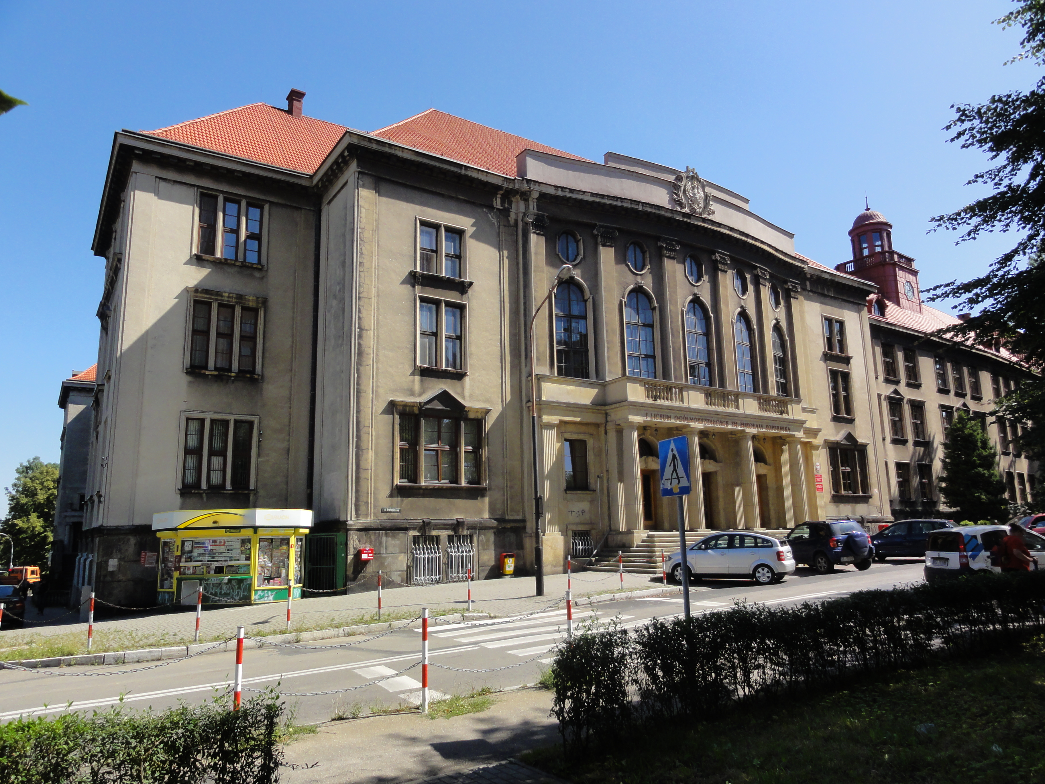 Bielsko-Biała, Listopadowa 70, I LO im. M. Kopernika, Zespół Szkół Ogólnokształcących dla Dorosłych